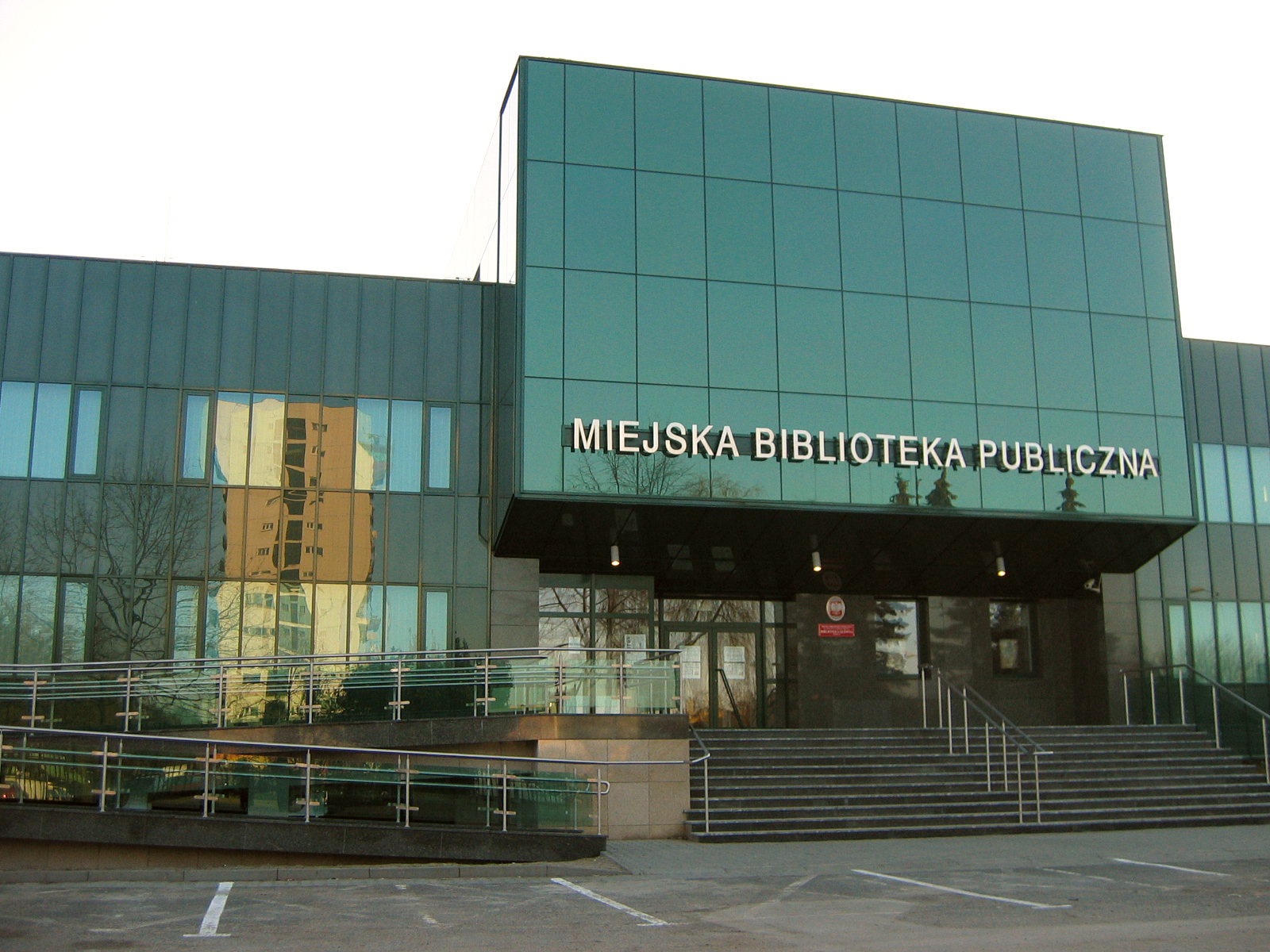 Library in Dąbrowa Górnicza